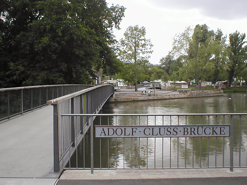 Die Adolf-Cluss-Brücke in Heilbronn verbindet die Neckarstraße und die historische wichtige Neckarinsel Hefenweiler, ein weiterer Steg führt außerdem weiter zur Kraneninsel.